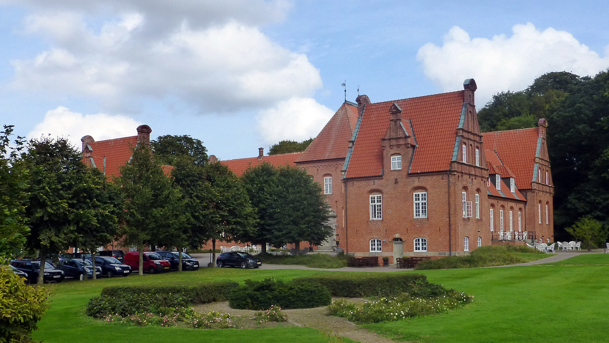 Sophiendal er en herregård i Veng Sogn i Skanderborg Kommune; set fra sydvest